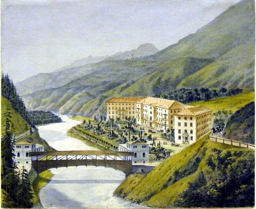 Vulpera (bei Tarasp), anonymes Aquarell von ca. 1900